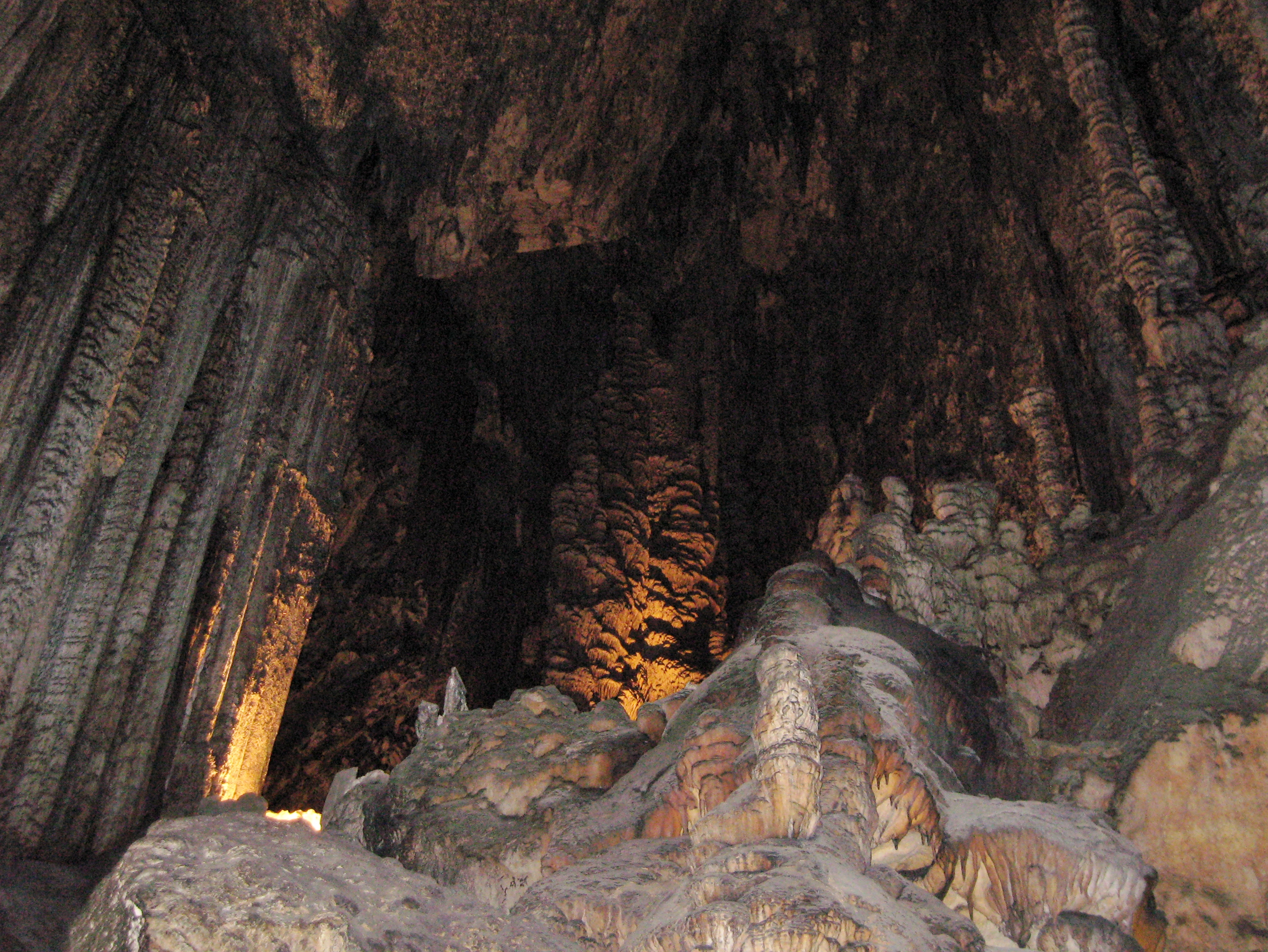 Coves d’Artà, Gemeinde Capdepera, Mallorca, Spanien